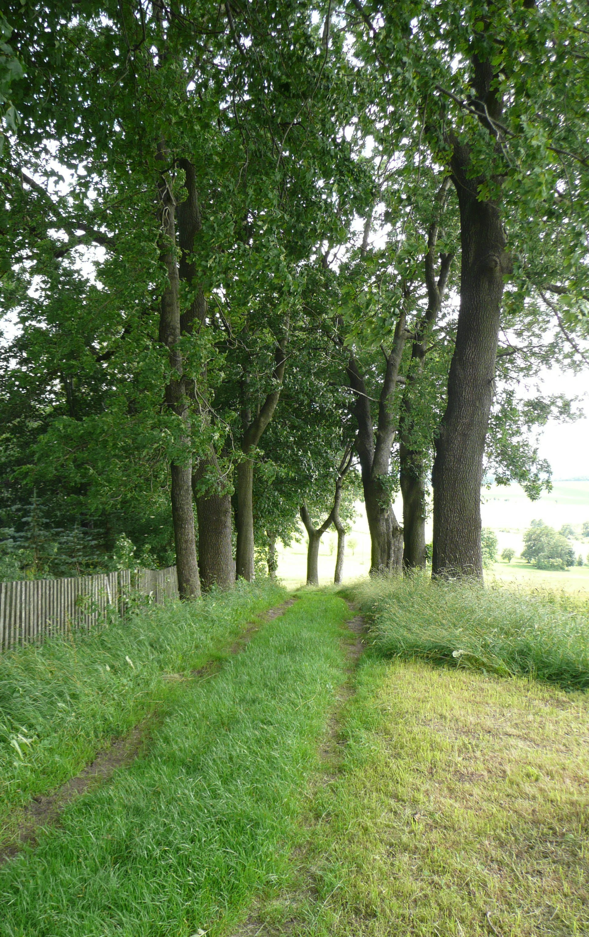 Wassergasse, Sayda; ehem. Stadbefestigung, eingeebnet zum Feldweg